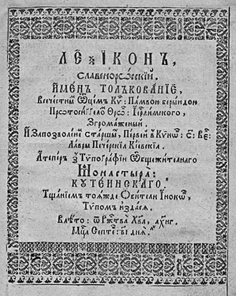 Памво Берында. "Лексикон". тип. Кутеинского монастыря. 1653 г.